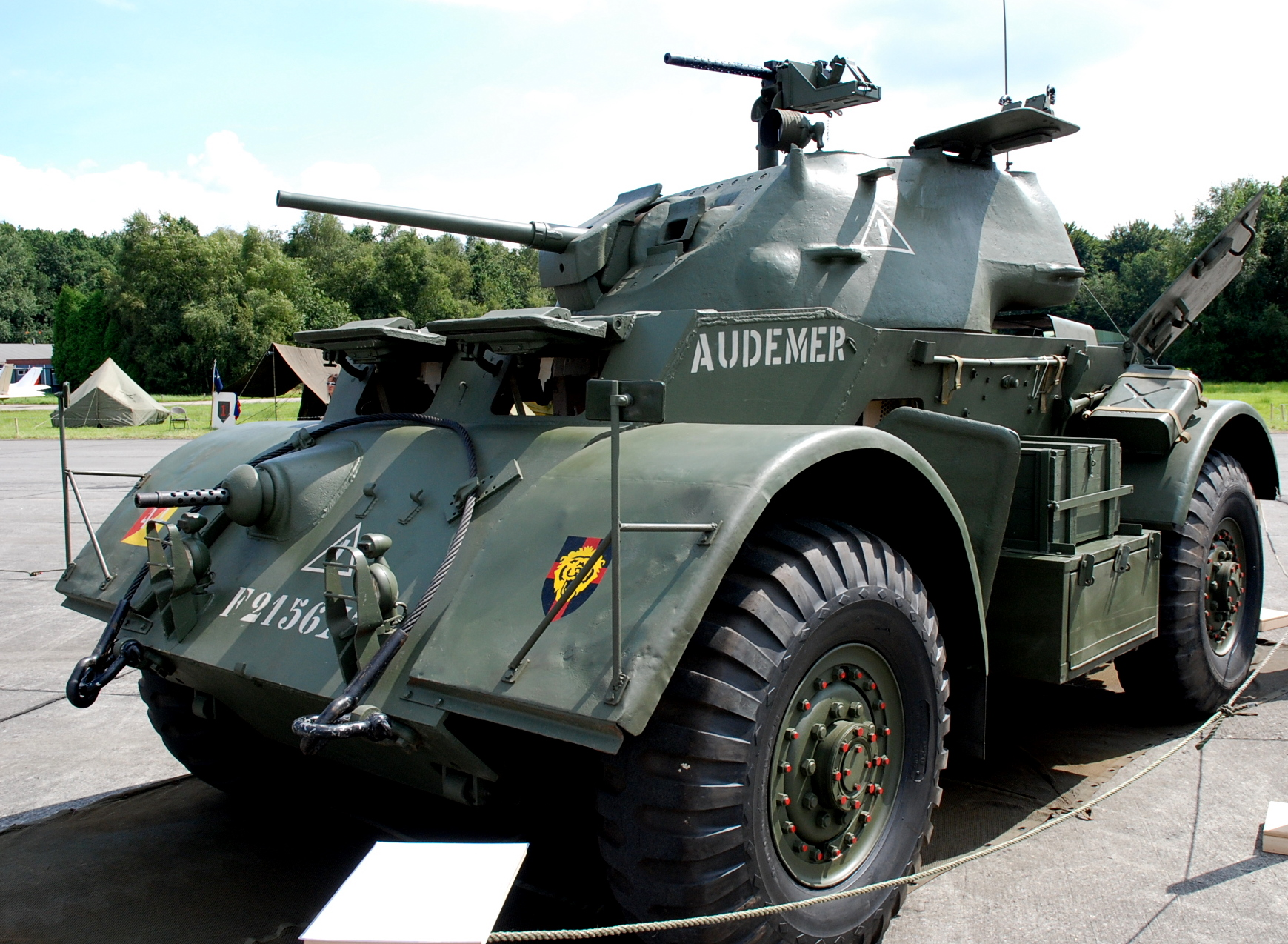 Pantserwagen Staghound tijdens een statische show op het vliegveld van Ursel, België